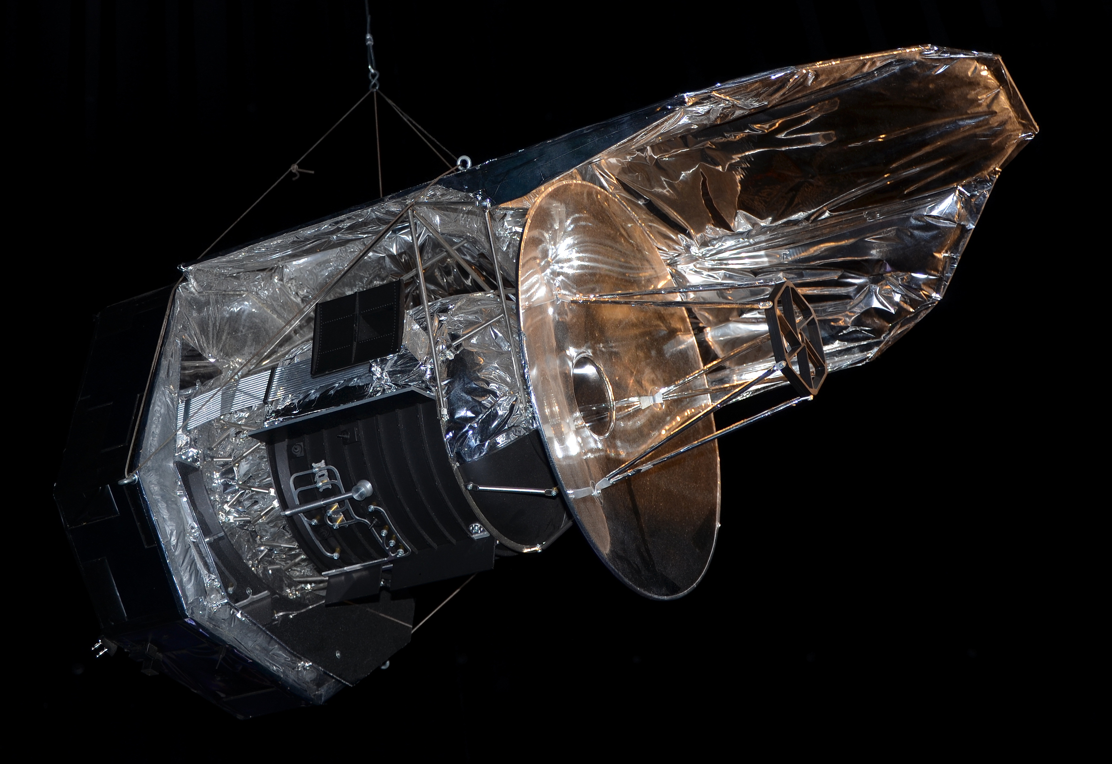 Maquette Herschel salon du Bourget 2013